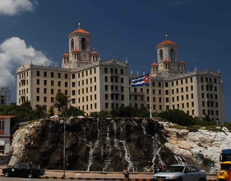 Cuba, augustus 2006, info in de Metadata